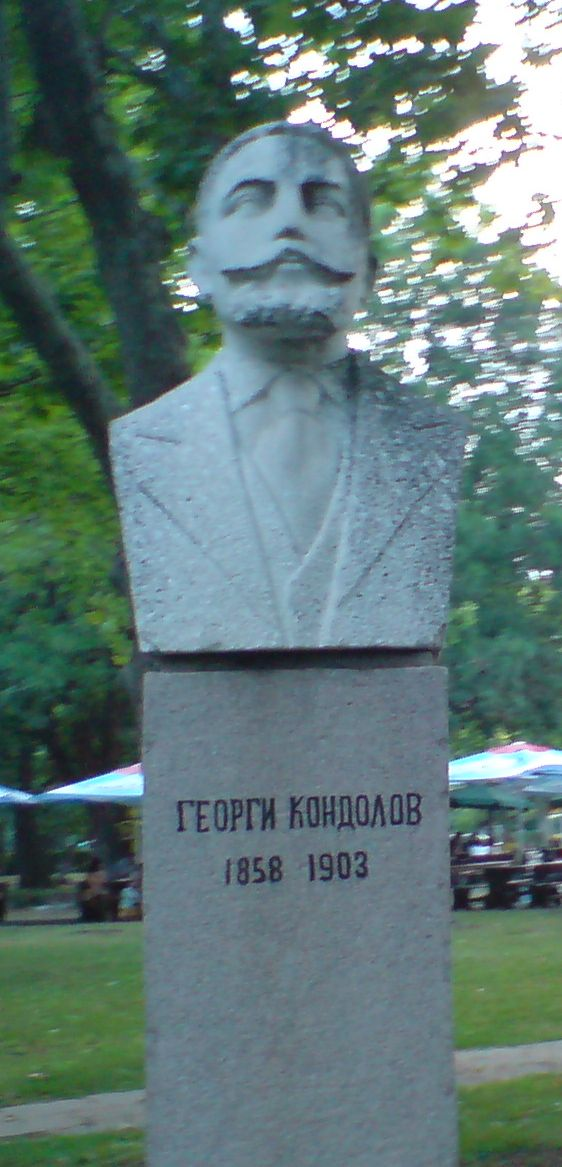 Georgi Kondolow - (* 1858 Potirnak, heute Welikа, Bulgarien; † 6. August 1903 Paspalowo, heute Armutveren, Türkei) war ein bulgarischer Revolutionär, Freiheitskämpfer, Wojwode der BMARK (Bulgarische Makedonisch-Adrianopeler Revolutionäre Komitees) sowie einer der Führer des Ilinden-Preobraschenie-Aufstandes in der „7. revolutionären Region“, die Ostthrakien einschloss.